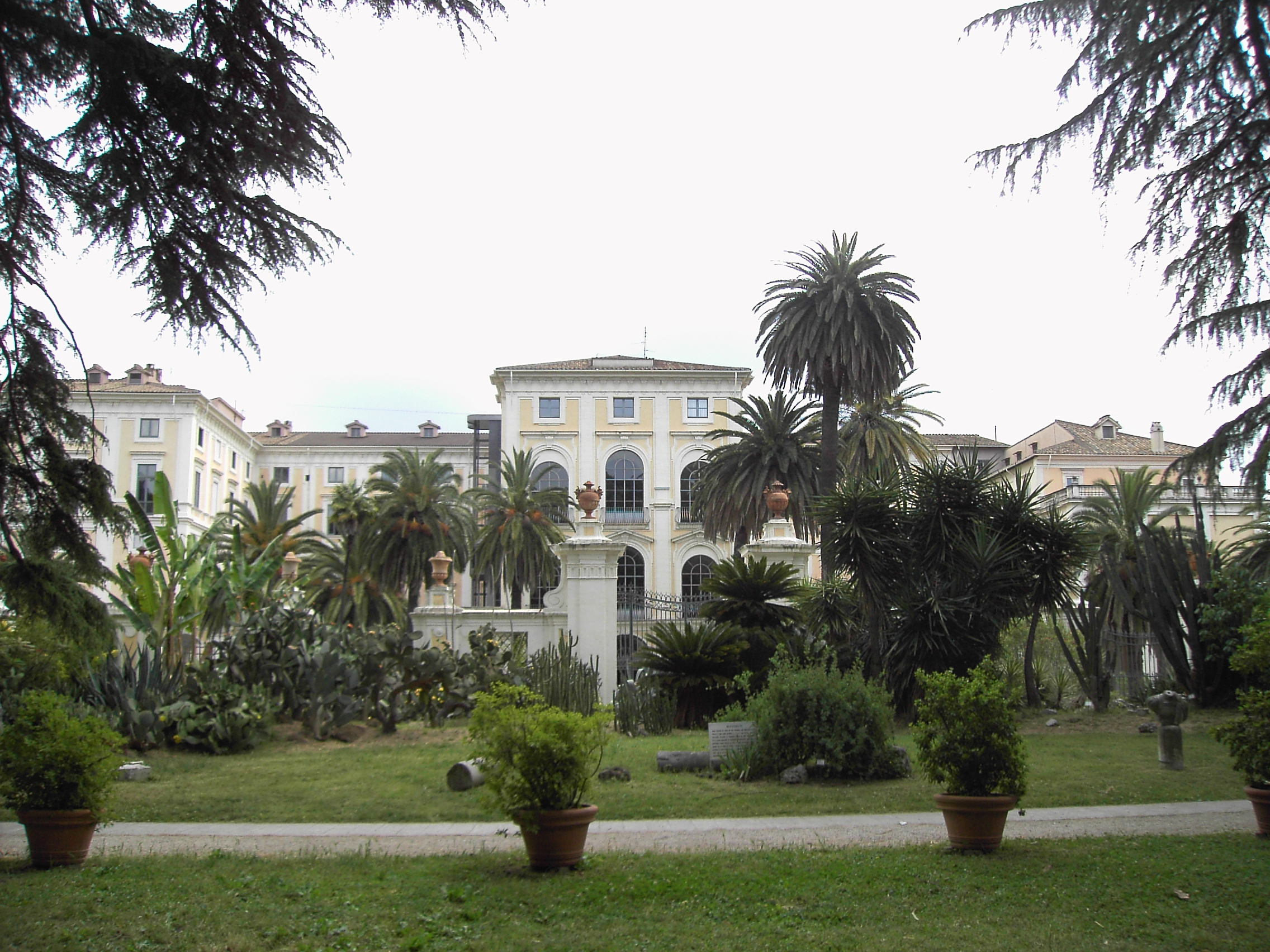 Roma , Orto botanico: Villa Corsini (facciata verso il parco)